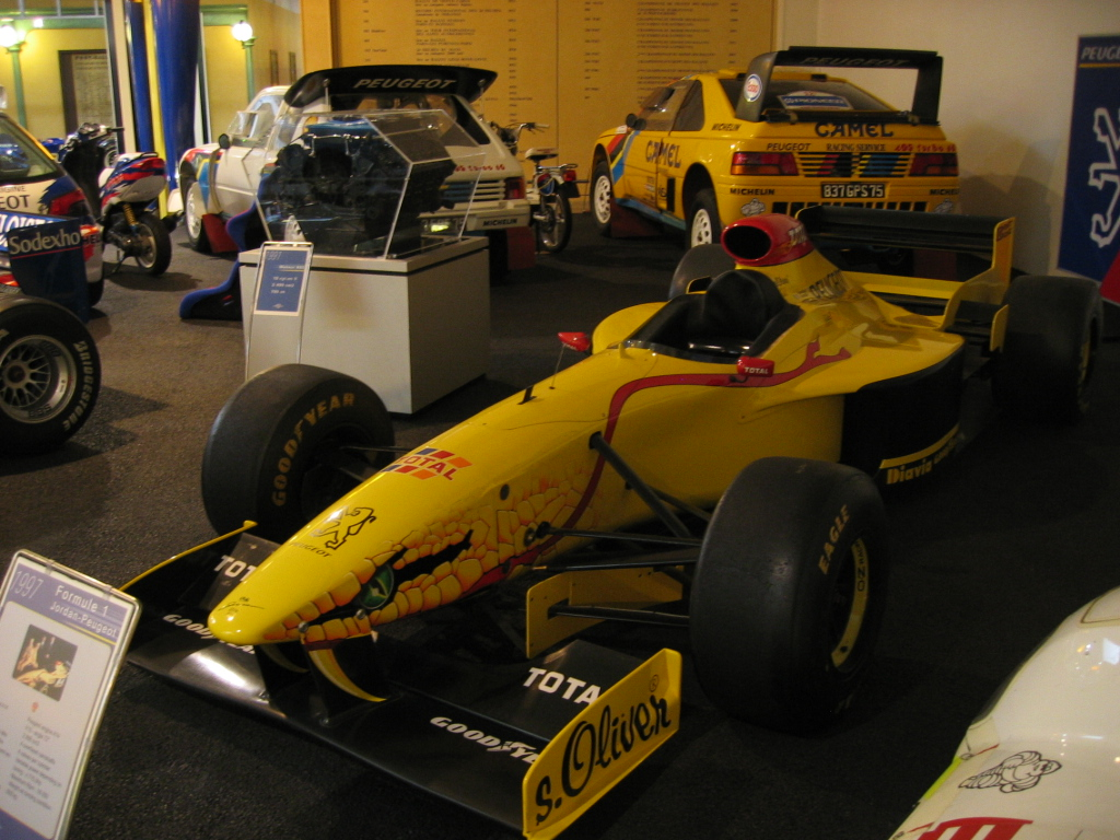 Jordan Peugeot F1